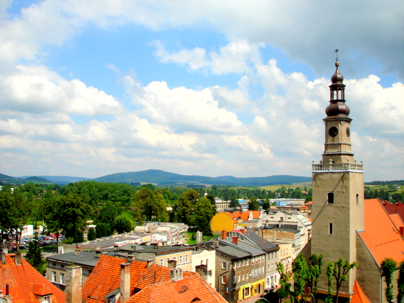 Panorama Kamiennej Góry